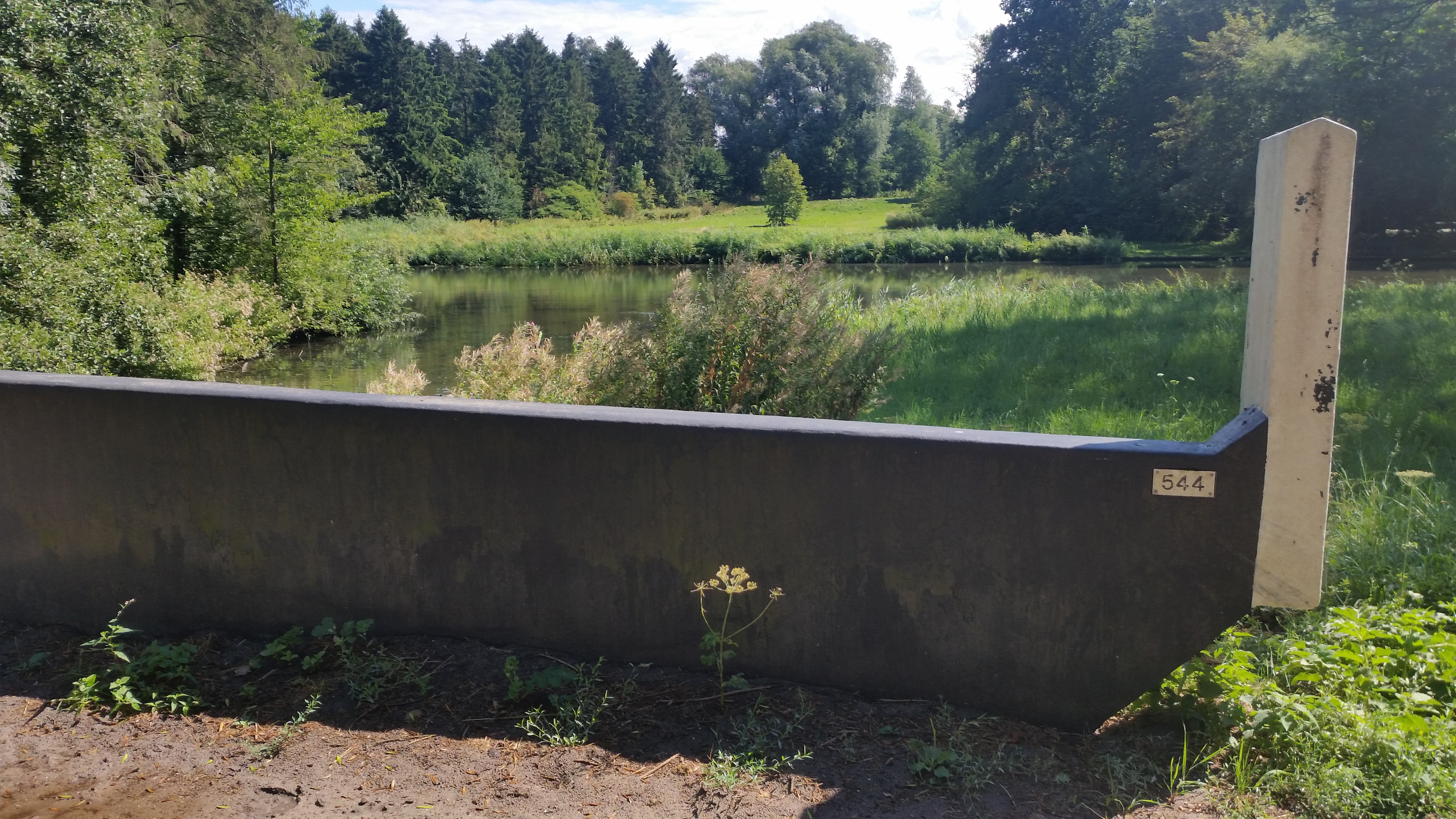 Brug 544 (in Amsterdam), kunstzinnige pilaar en borstwering met nummerplaatje